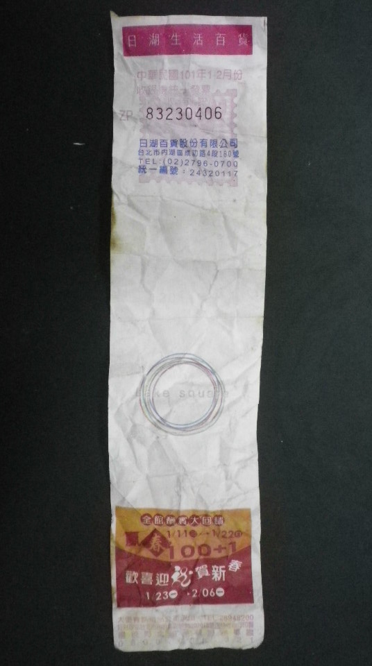 日湖生活百貨的中華民國101年1-2月份收銀機統一發票